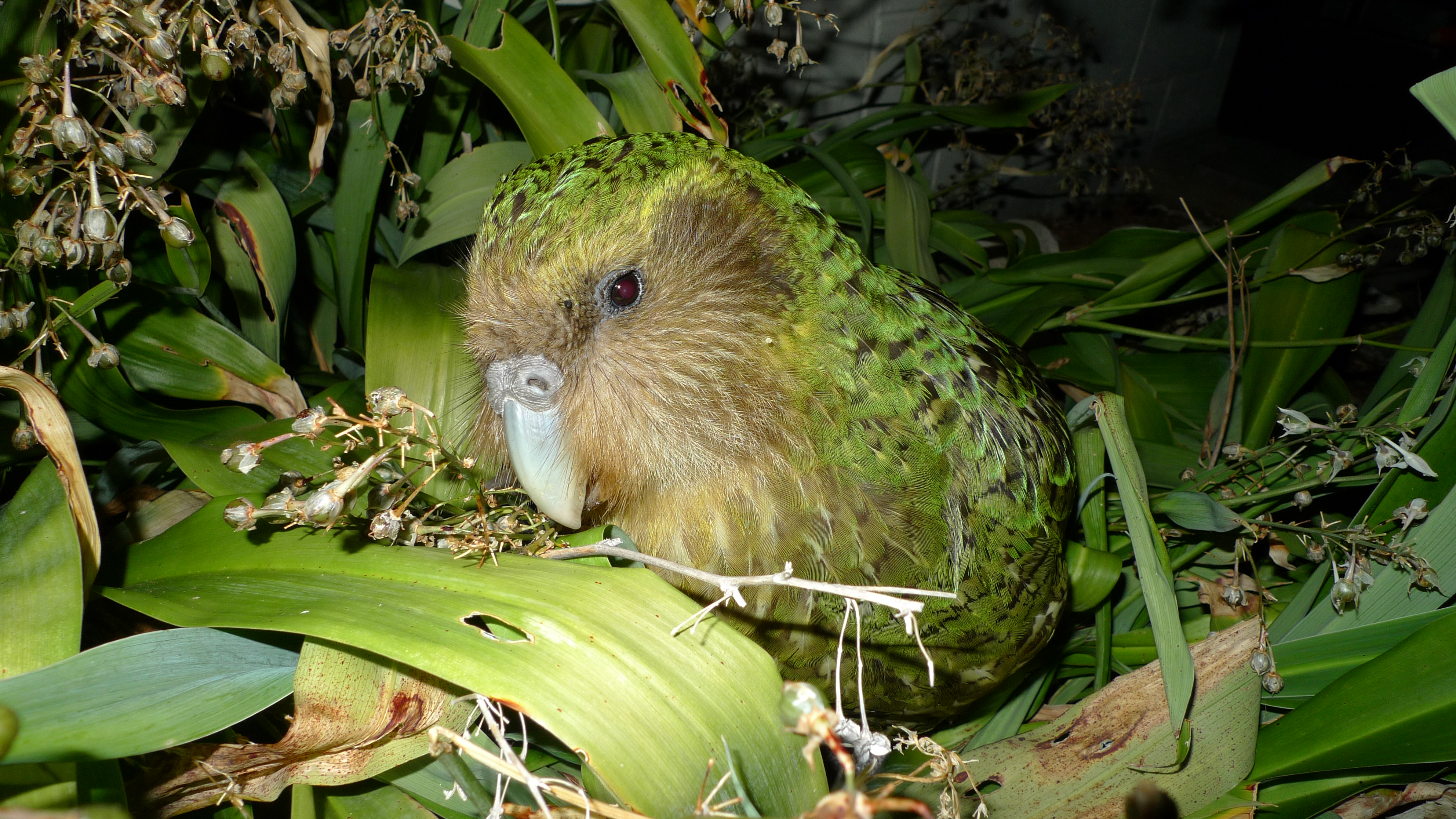 Kakapo Strigops habroptila "Sirocco" amongst renga renga lillies. Maud Island, New Zealand. Photo: Chris Birmingham, 2012.